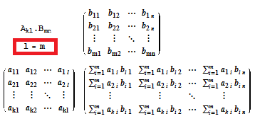 Üldistatud kuju meeldetuletusega, et esimese maatriksi ridade arv peab võrduma teise maatriksi veergude arvuga.